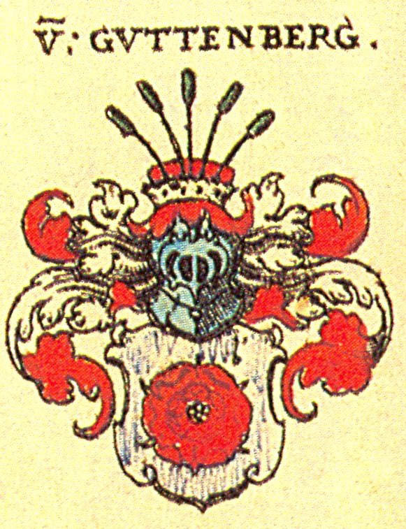 Ritterschaft und Adel in Franken